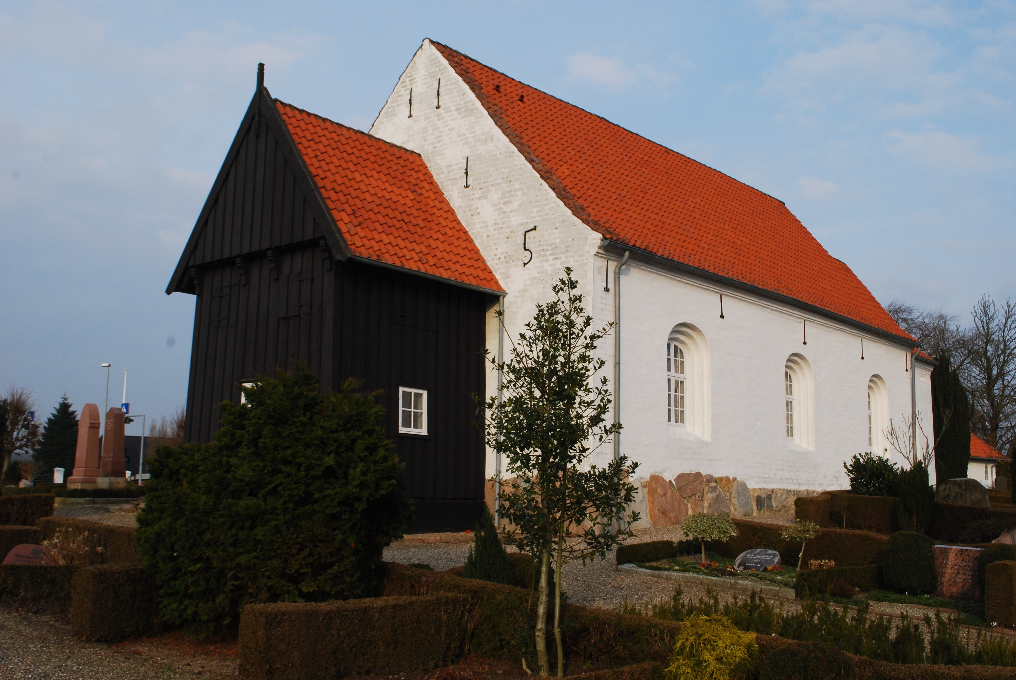 Adsbøl Kirke, Sønderborg Kommune, Danmark